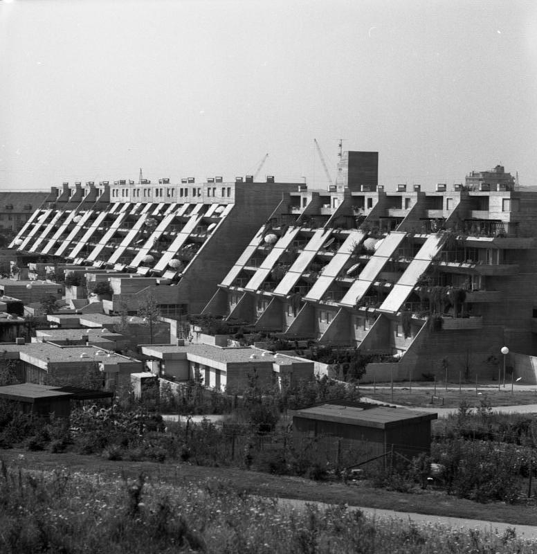 Stuttgart Demonstrativbauvorhaben, Hügelhaus an der Tapachstraße